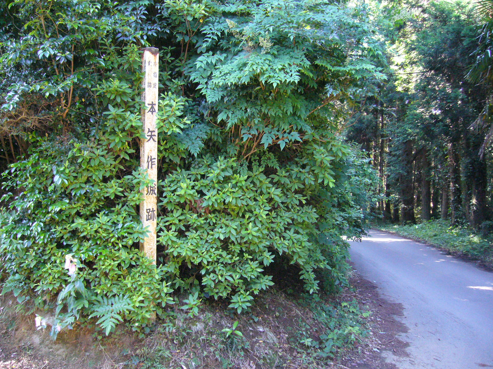 motoyahagi-castle,katori-city,japan